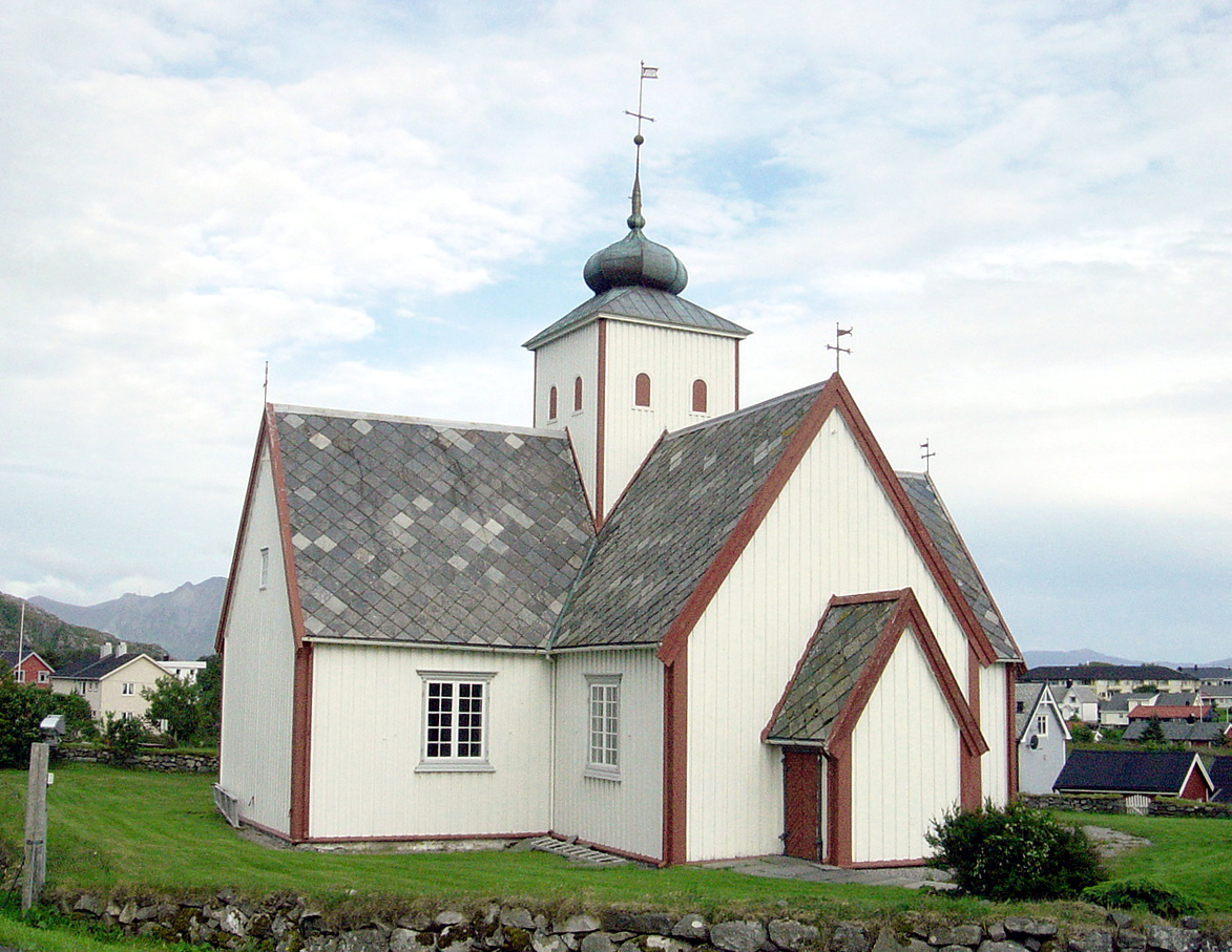 Fræna and the Bud kirke